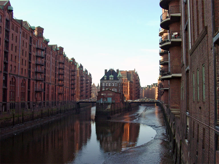 Fleet in der Hamburger Speicherstadt bei fast abgelaufenem Wasser. Links Holländischbrookfleet und rechts Wandrahmsfleet. This is a photograph of an architectural monument.